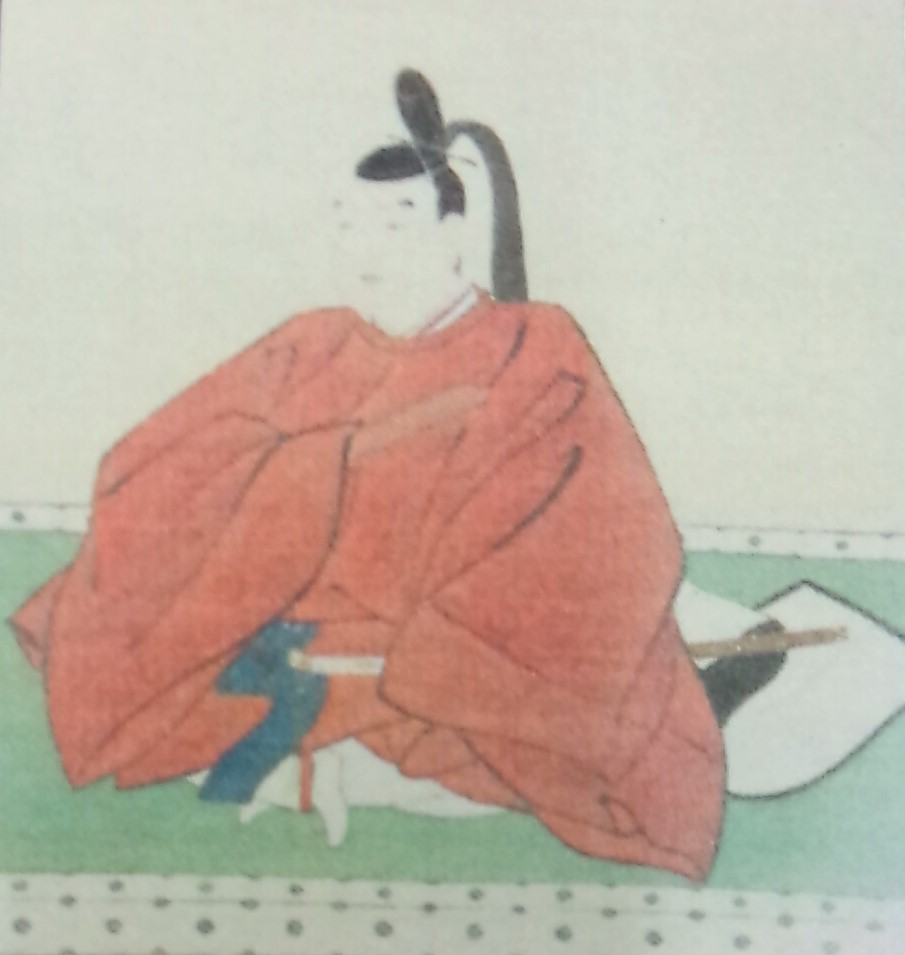 鍋島忠茂の肖像。